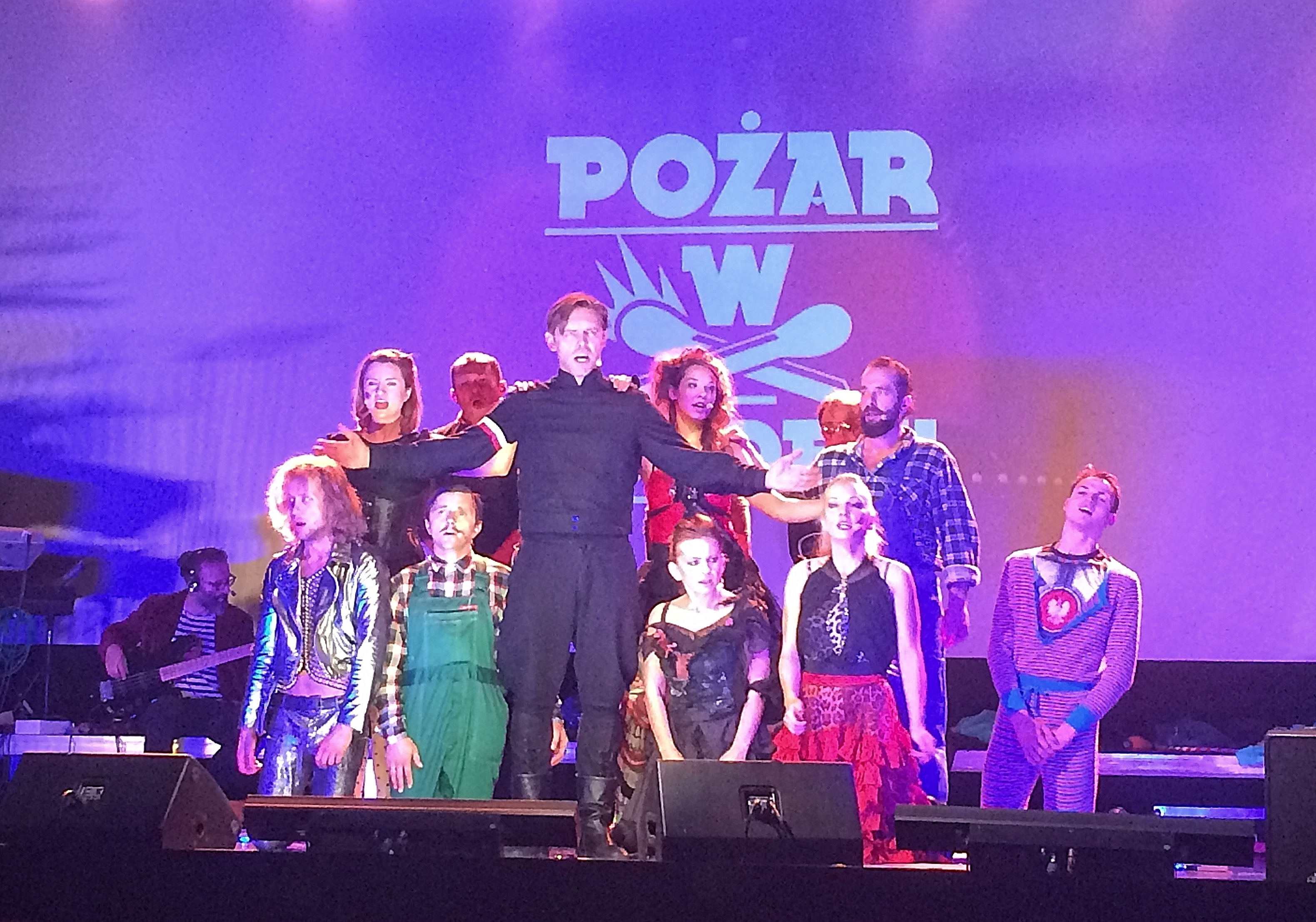 Pożar w burdelu w trakcie przedstawienia Demony Żoliborza (odc. 31) w Kinie Elektronik